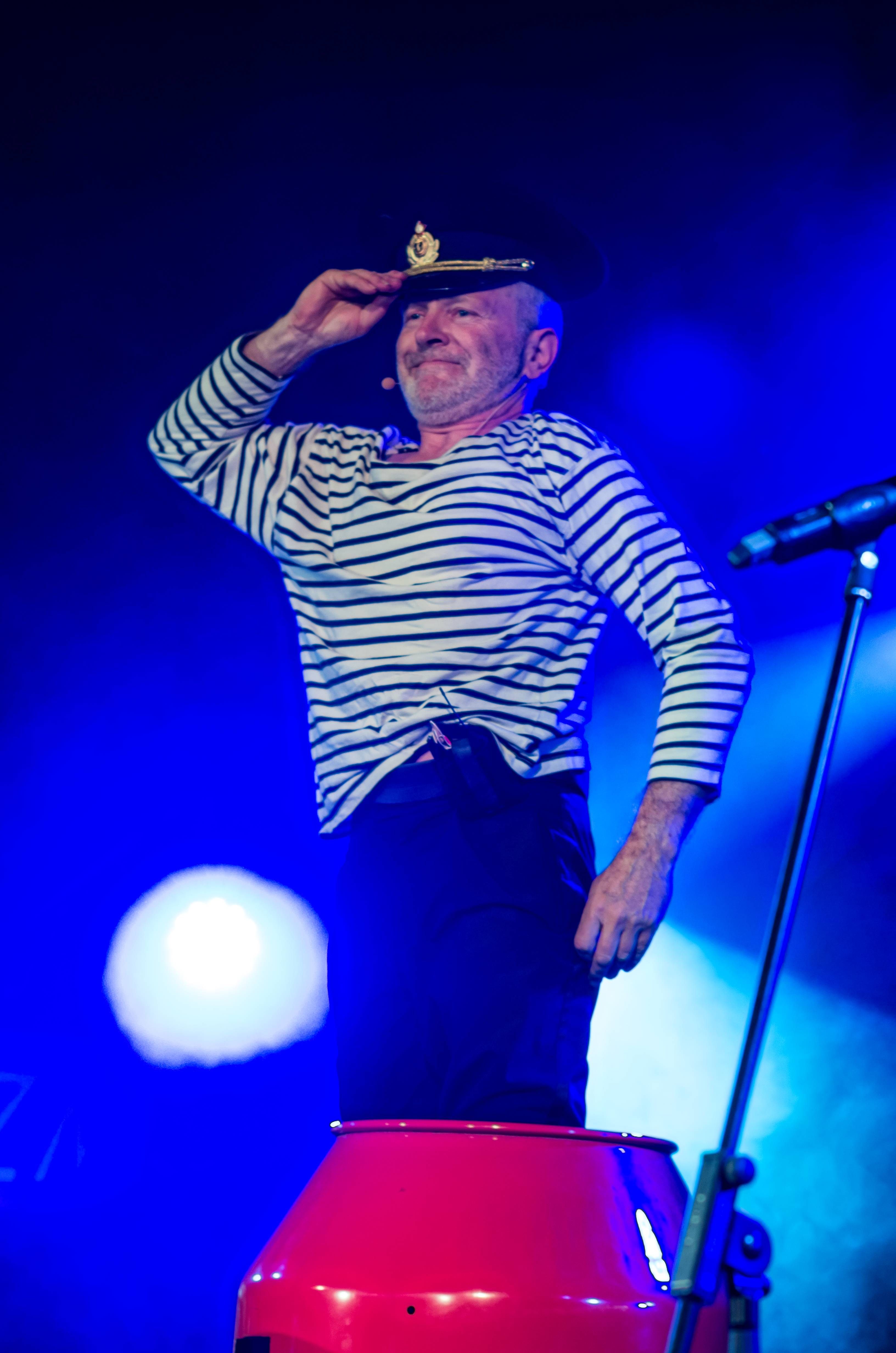 Bilder vom ZMF 2015 Die kleine Tierschau